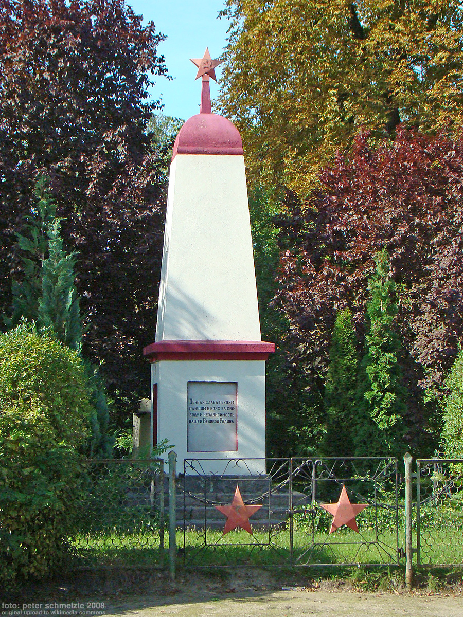 Sowjetisches Ehrenmal in Teterow